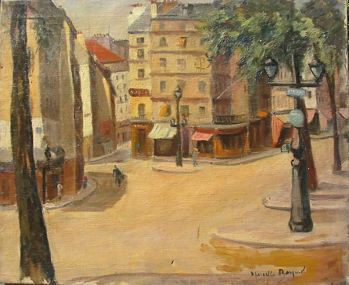 photo de peinture